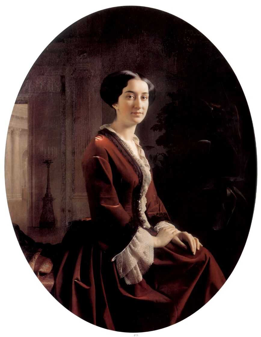 Портрет Е.Х.Абамелек-Лазаревой. 1854